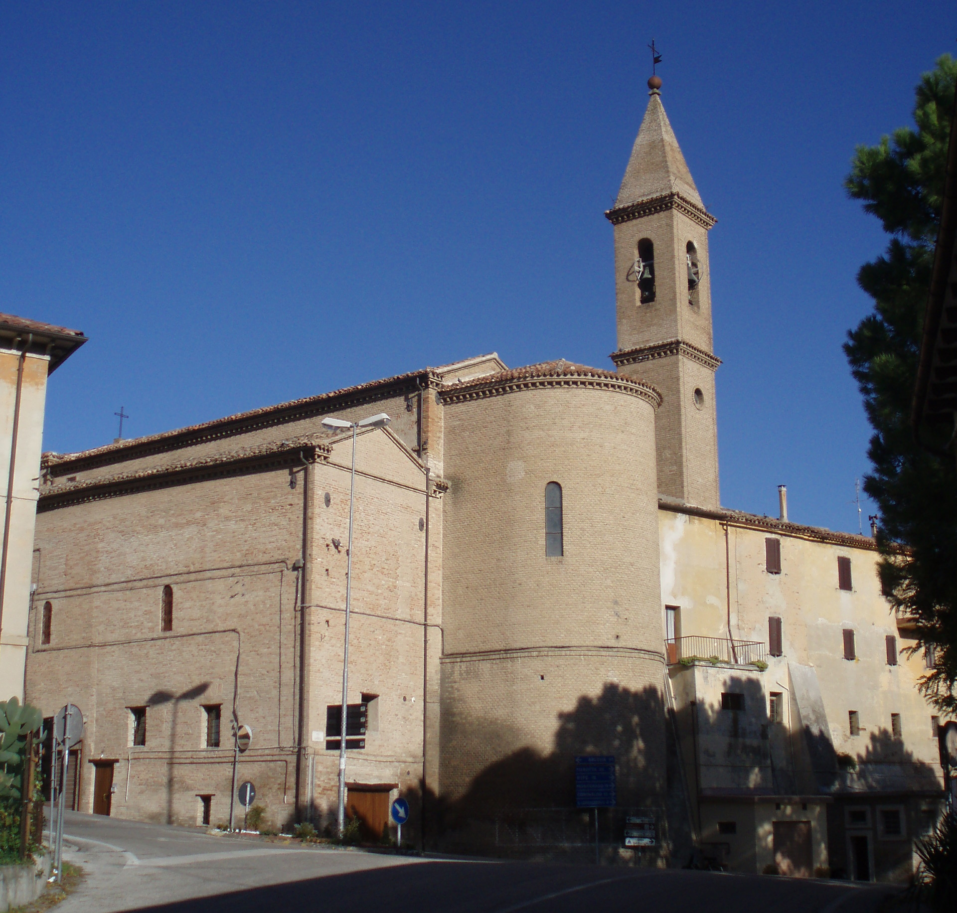 Chiesa_parrocchiale_SS_Pietro_e_Paolo_di_Castelleone_di_Suasa,_Italia_-_Abside_e_campanile_1